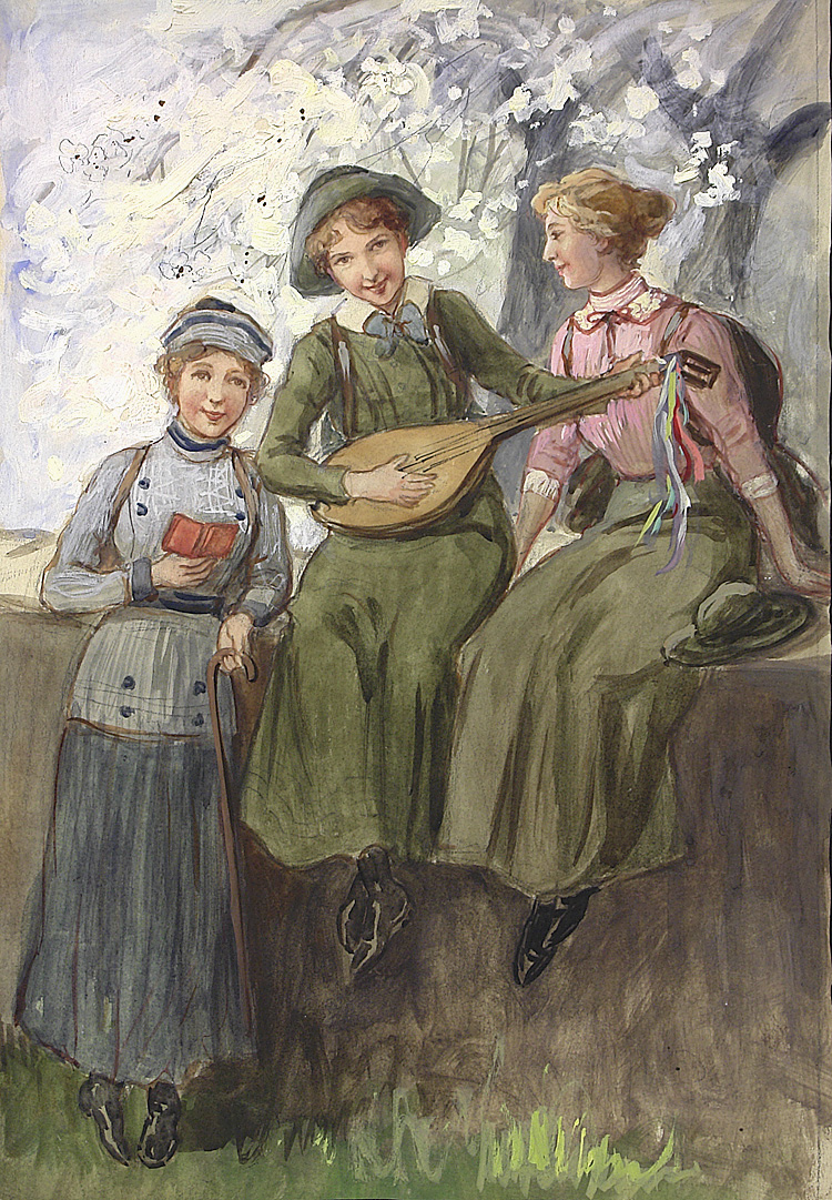 Drei Mädchen beim Musizieren in der Natur, (im Umkreis der Jugendbewegung/des Wandervogel?), unbekannter Künstler, Anfang 20. Jh., Mischtechnik auf Malpapier